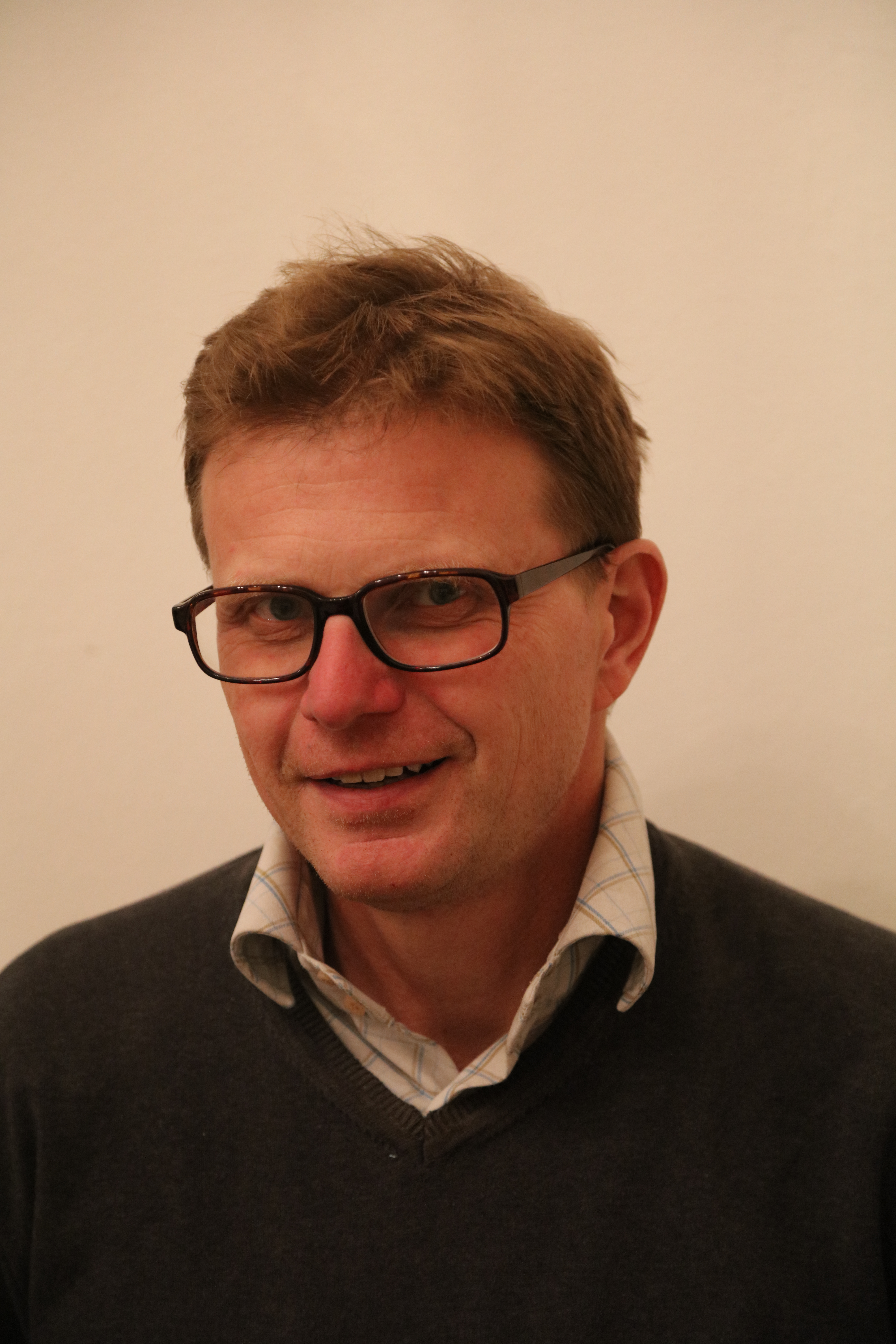 Andreas Schwab (* 17. Juli 1971) ist ein Schweizer Historiker, Kulturmanager und Autor. Aufnahme anlässlich Buchvernisage auf dem Monte Verità.